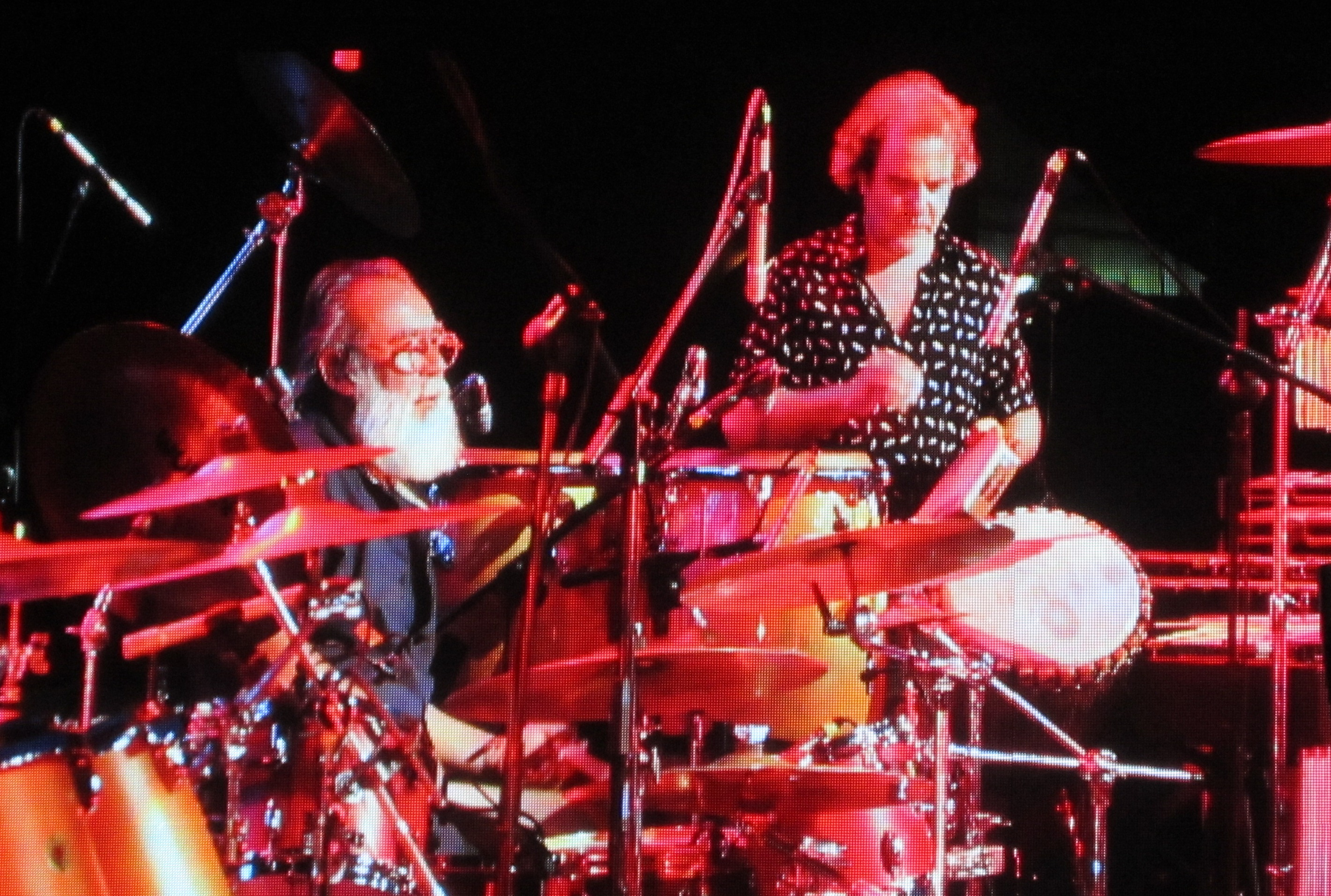 Congreso en el Rockodromo 2017